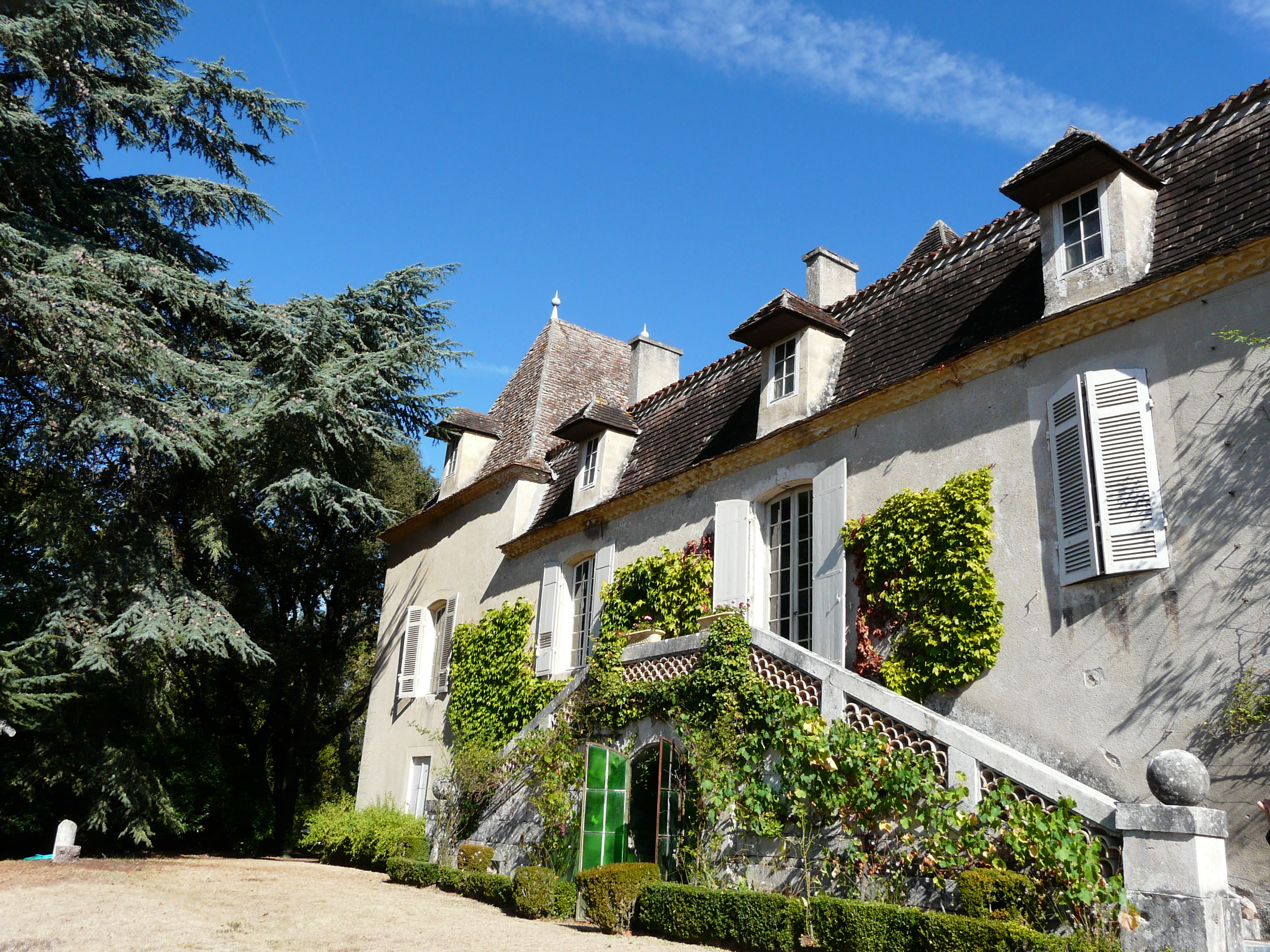 La façade sud et son escalier double, château de Pouthet, Eymet, Dordogne, France.